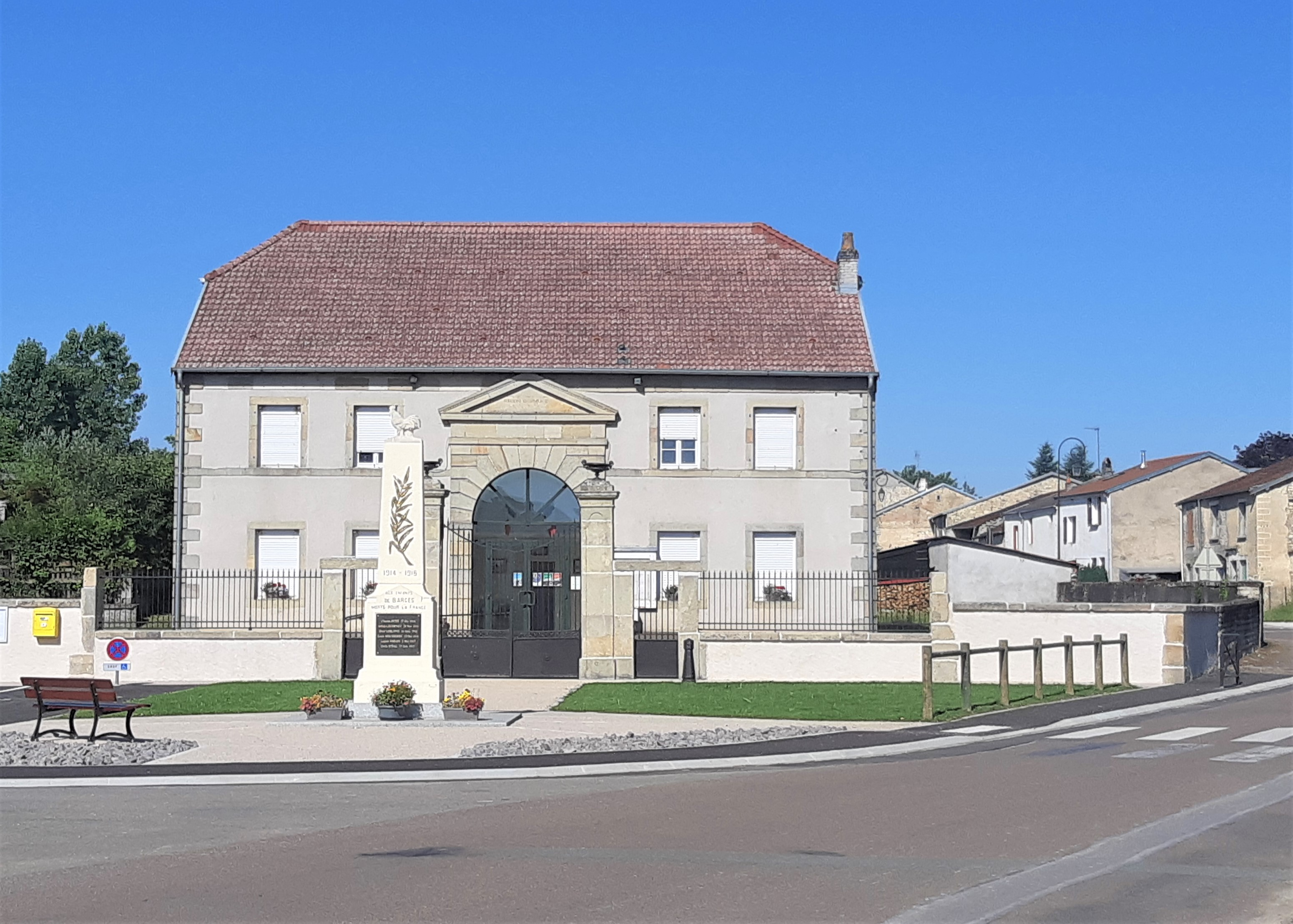 La place de la Mairie et le Monument aux Morts